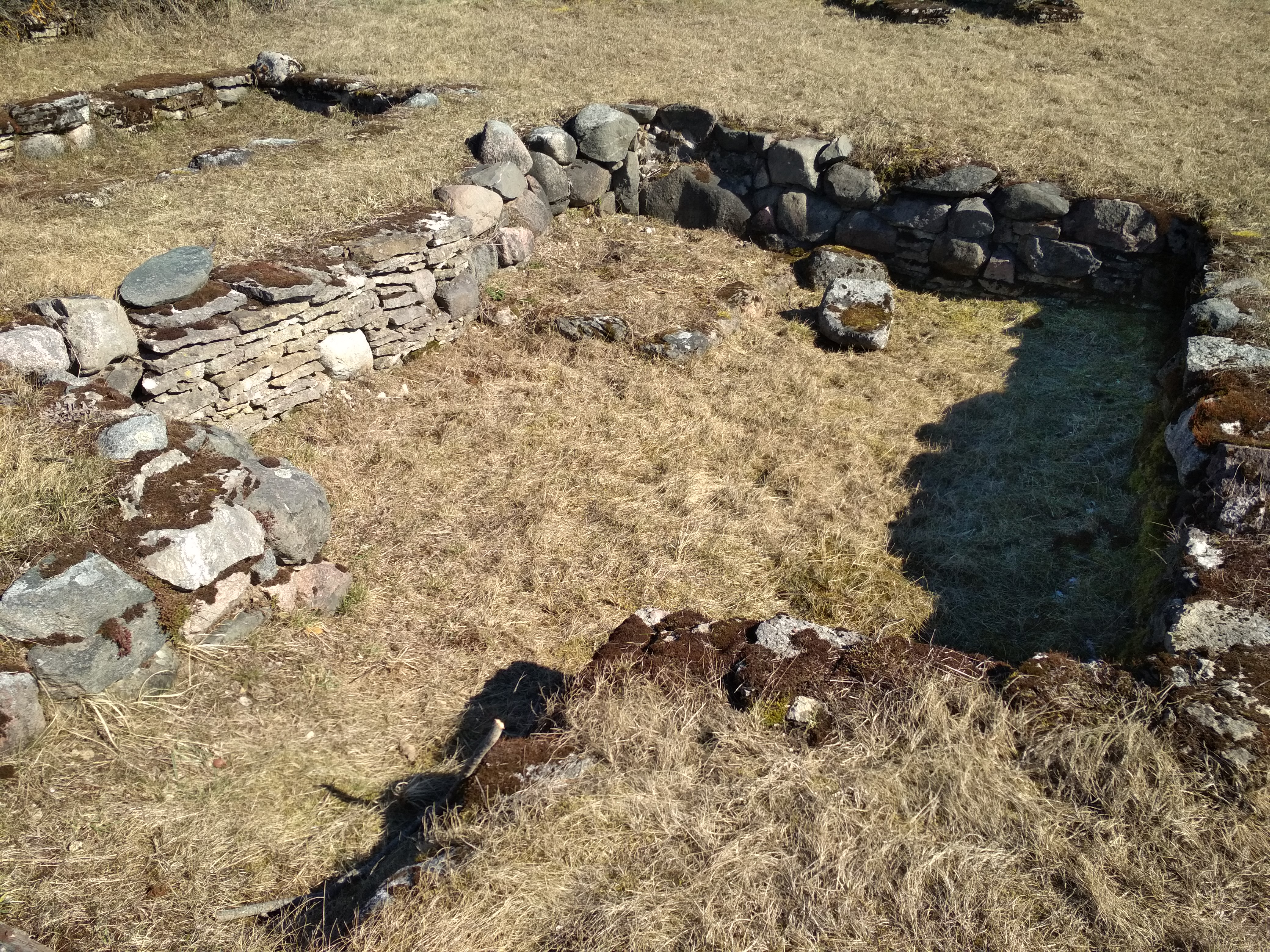 Lehmja asulakoha hoone kontuuride rekonstruktsioon (Pildikülas)